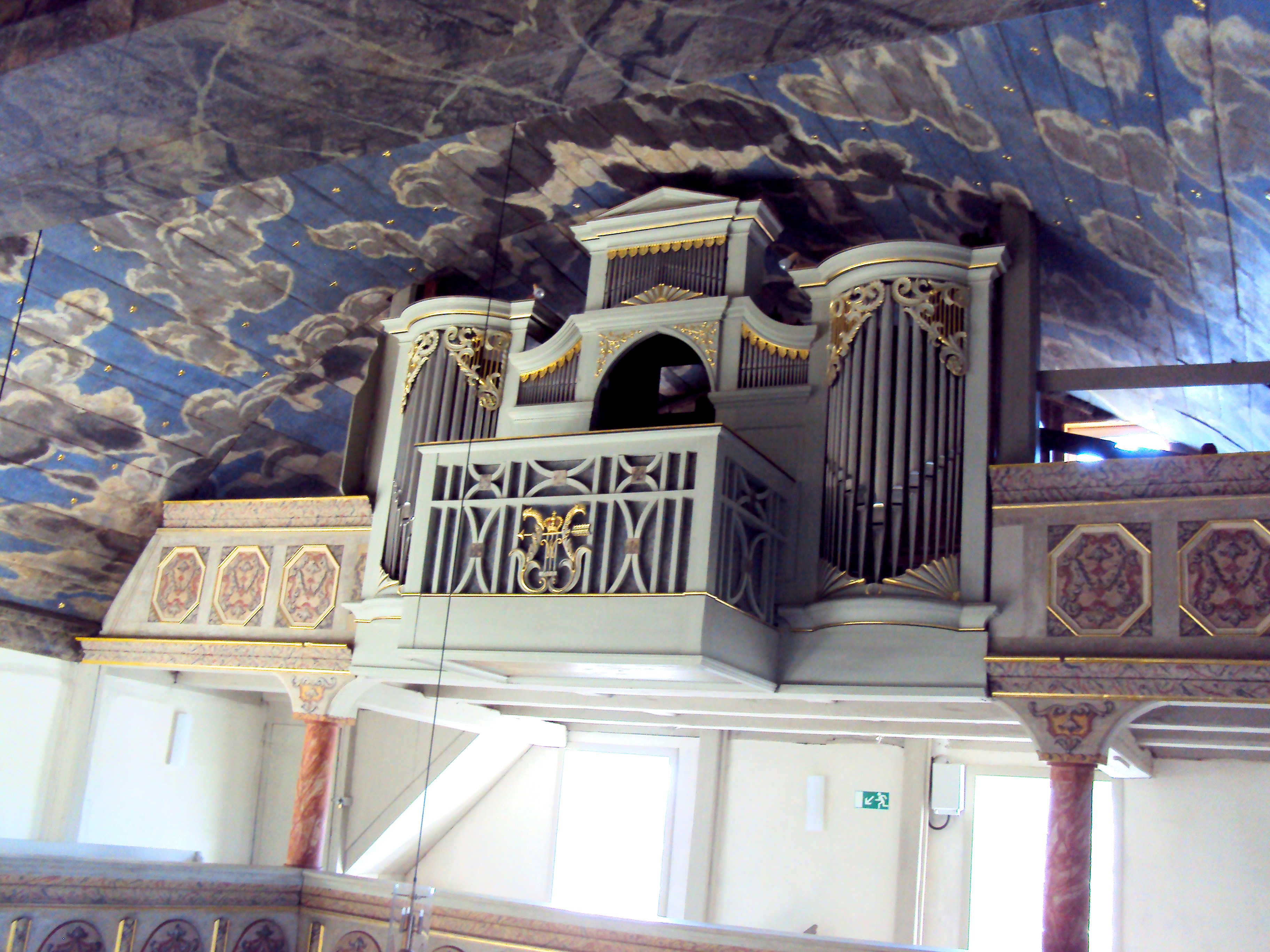 Die 2008 restaurierte Engelhardt-Orgel in der St. Salvador-Kirche in Trautenstein.